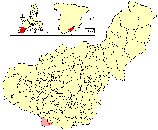 Situación de la localidad de Velilla-Taramay (en el municipio de Almuñécar) respecto a la provincia de Granada, en España.